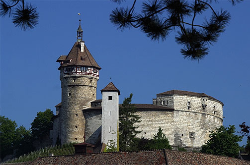 Munot in Schaffhausen (Nr. 03.1-5266)